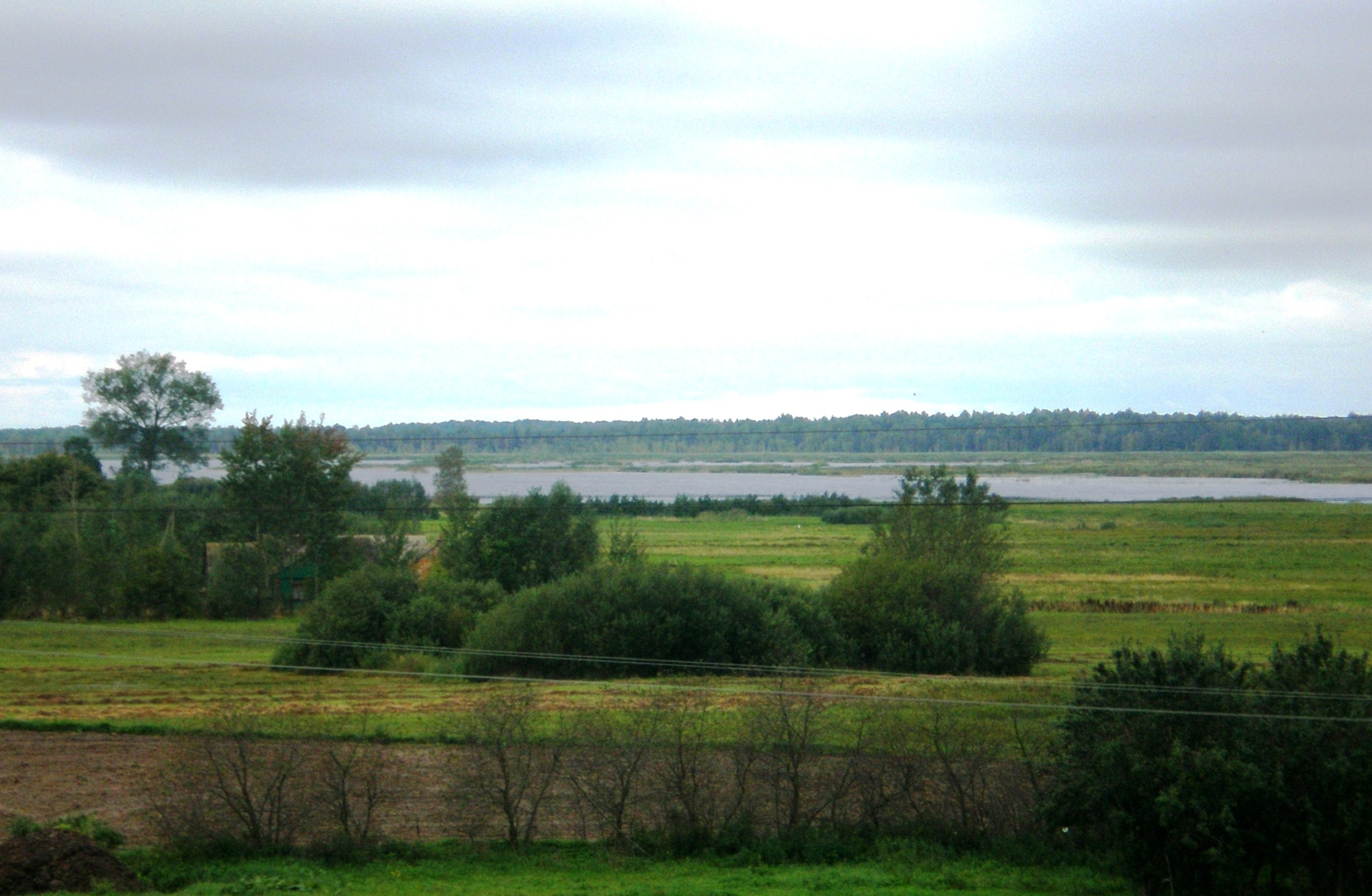 Vaizdas į Žuvintą ties Aleknonimis, Alytaus raj.